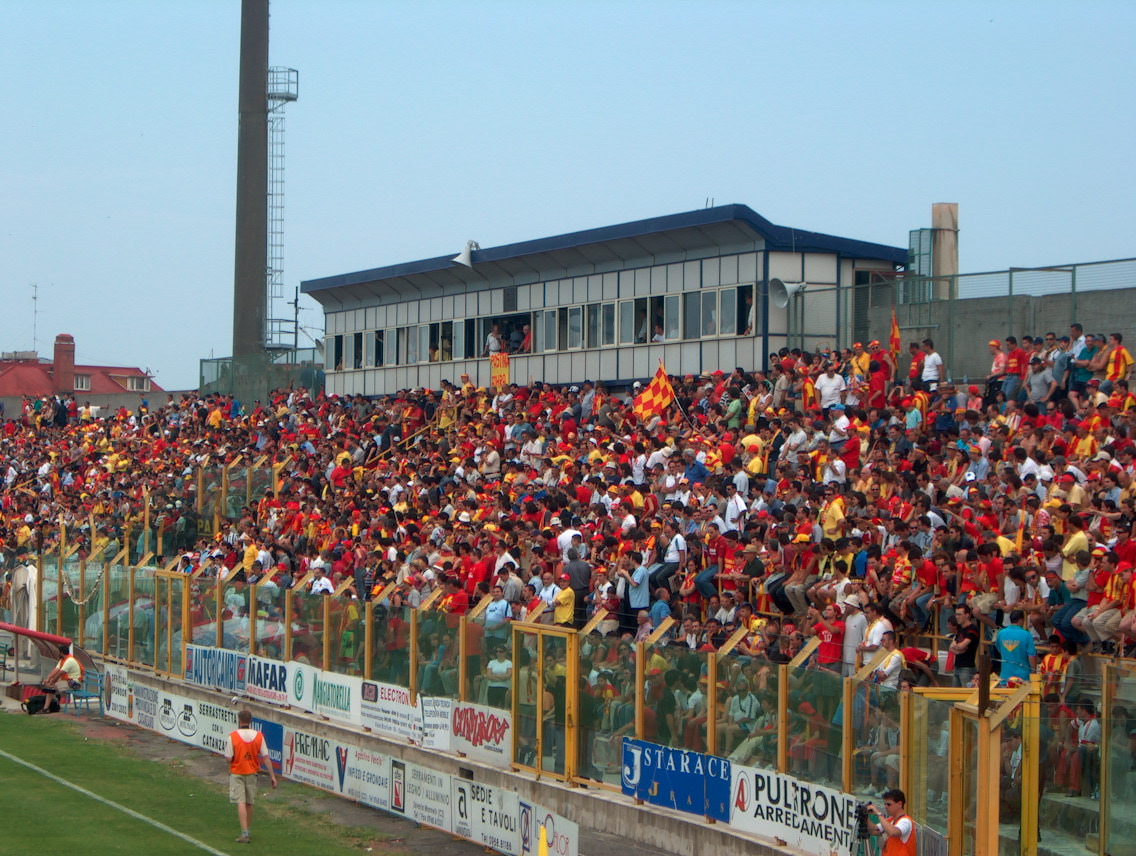 Stadio Nicola Ceravolo